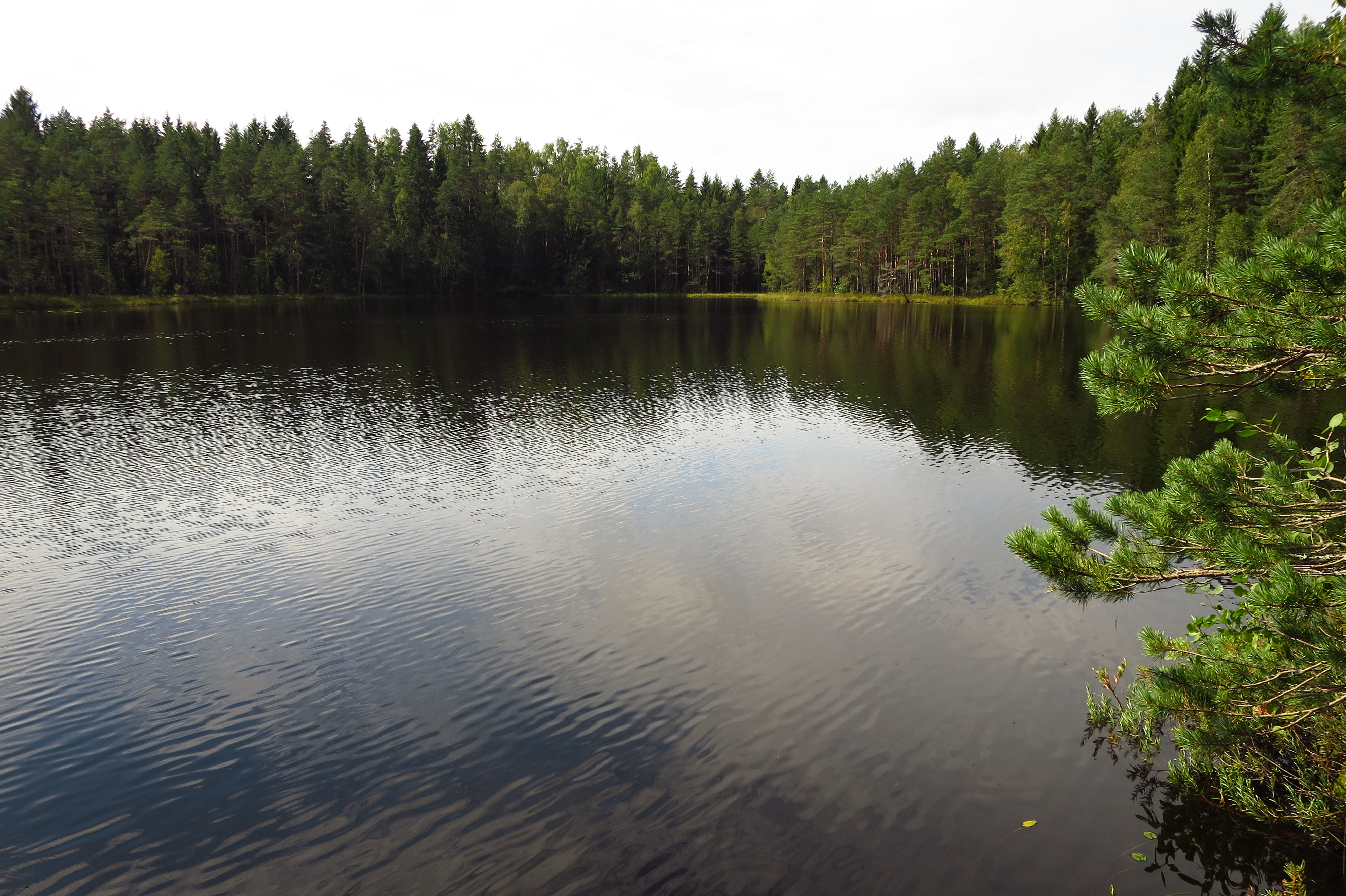 Luikjärv Kirikumäe MKA-l